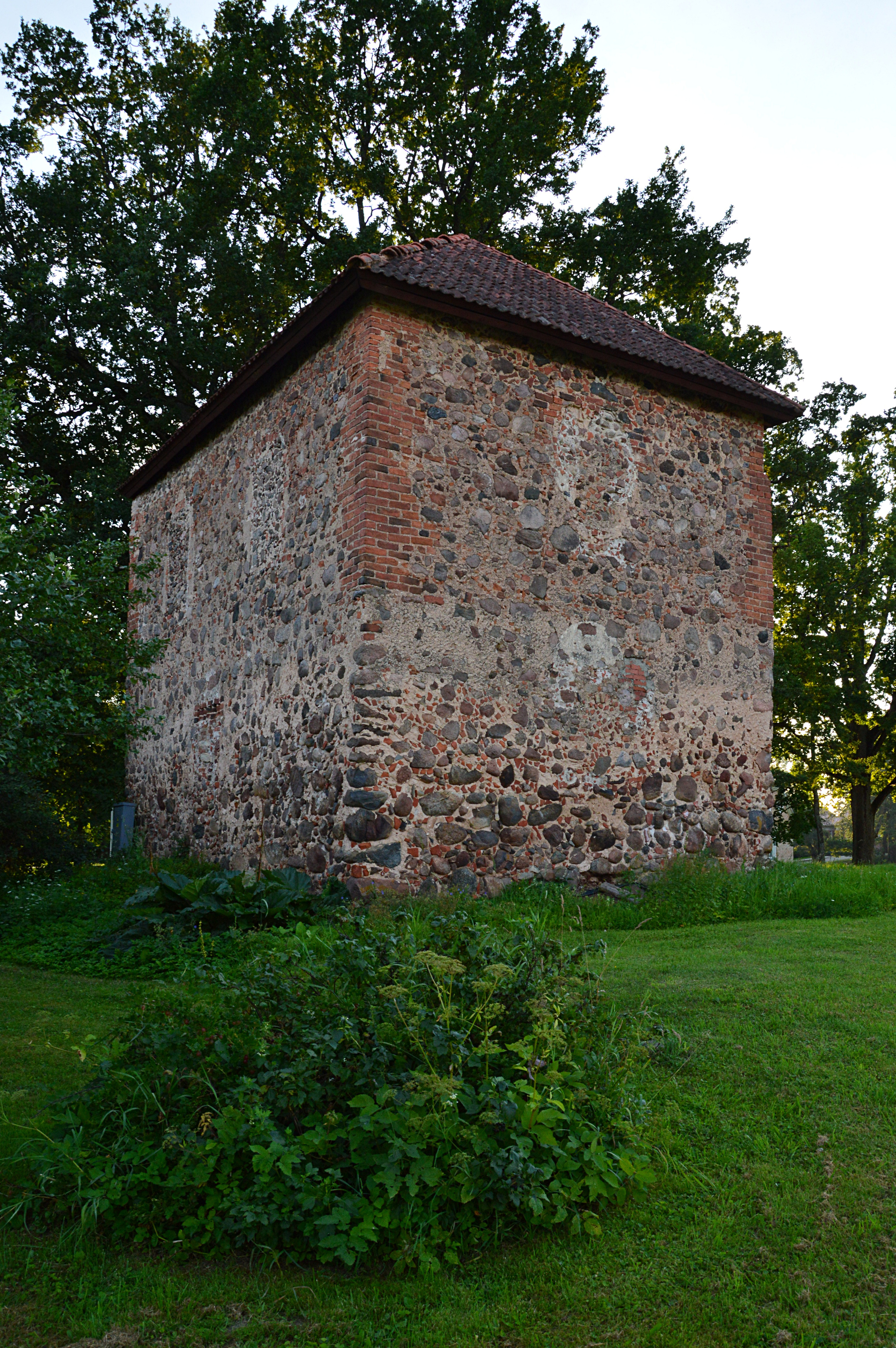 Mūrmuiža vasallilinnus